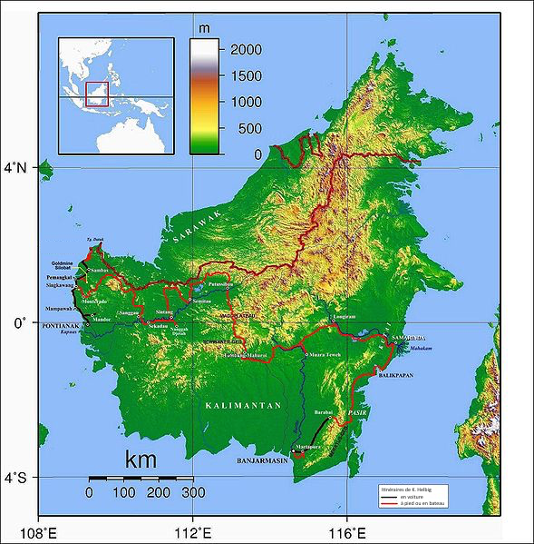 Carte représentant les itinéraires de voyage de Karl Helbig sur l'île de Bornéo.